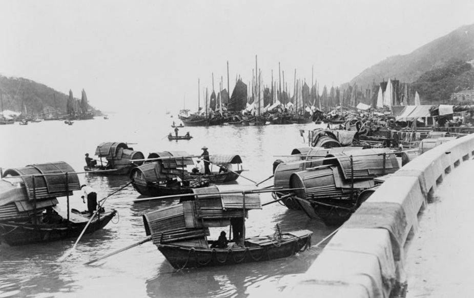 "Hong Kong--Sampans at a suburb"